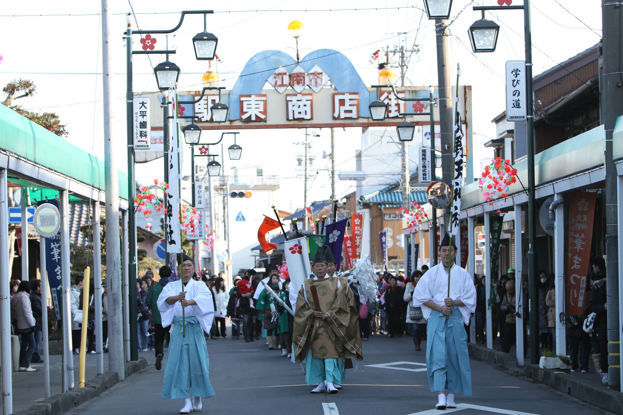 北野町天神(駅東商店街)